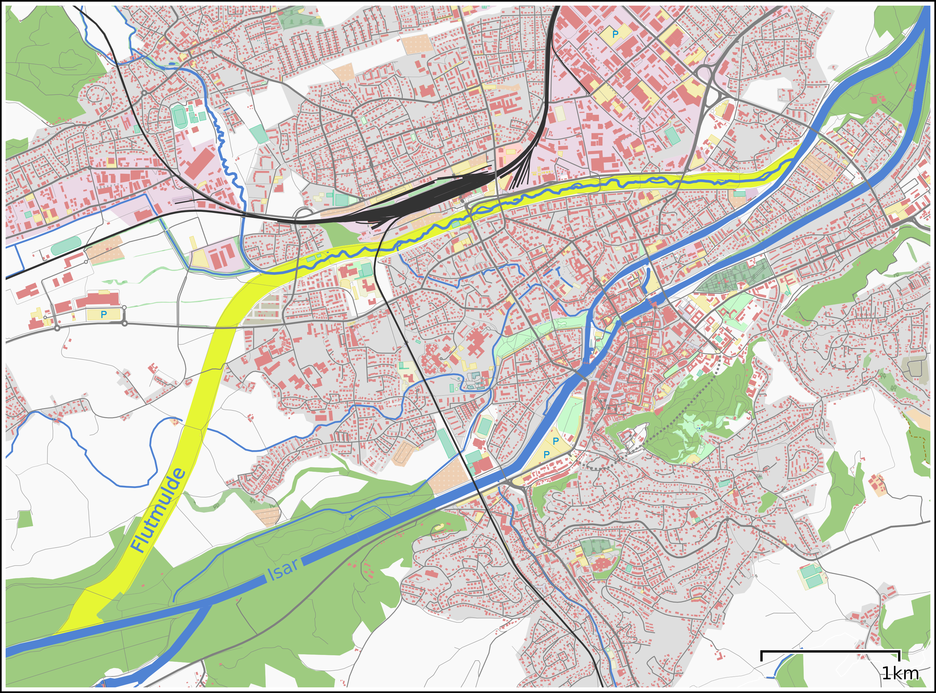 Karte der Flutmulde Landshut